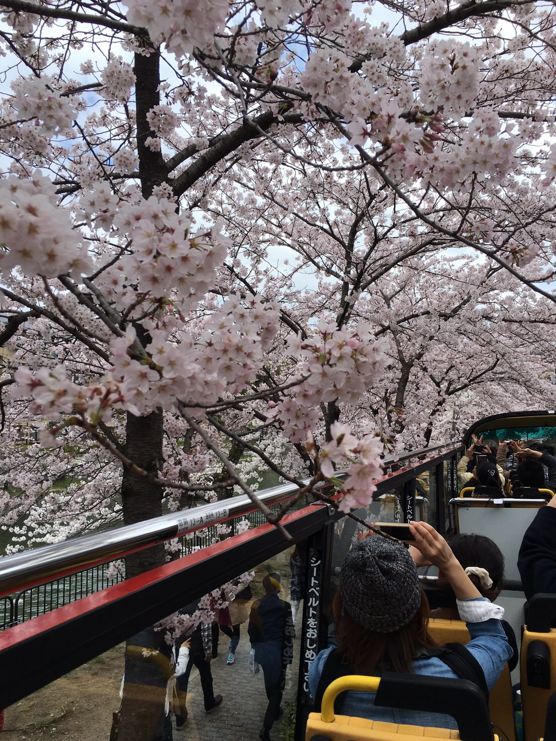 桜の花が車内まで！オープンならではの醍醐味（イメージ）